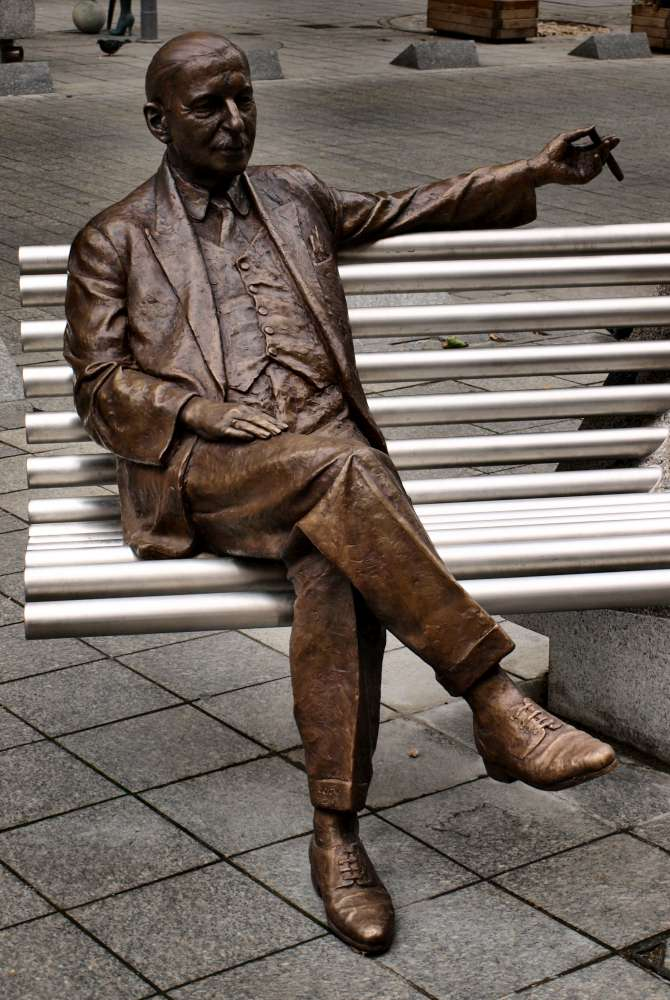 Kálmán Imre szobra Budapest, VI.ker., Nagymező utca, az Operettszínház bejáratával szemben. Veres Gábor alkotása